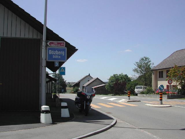 Bözberg